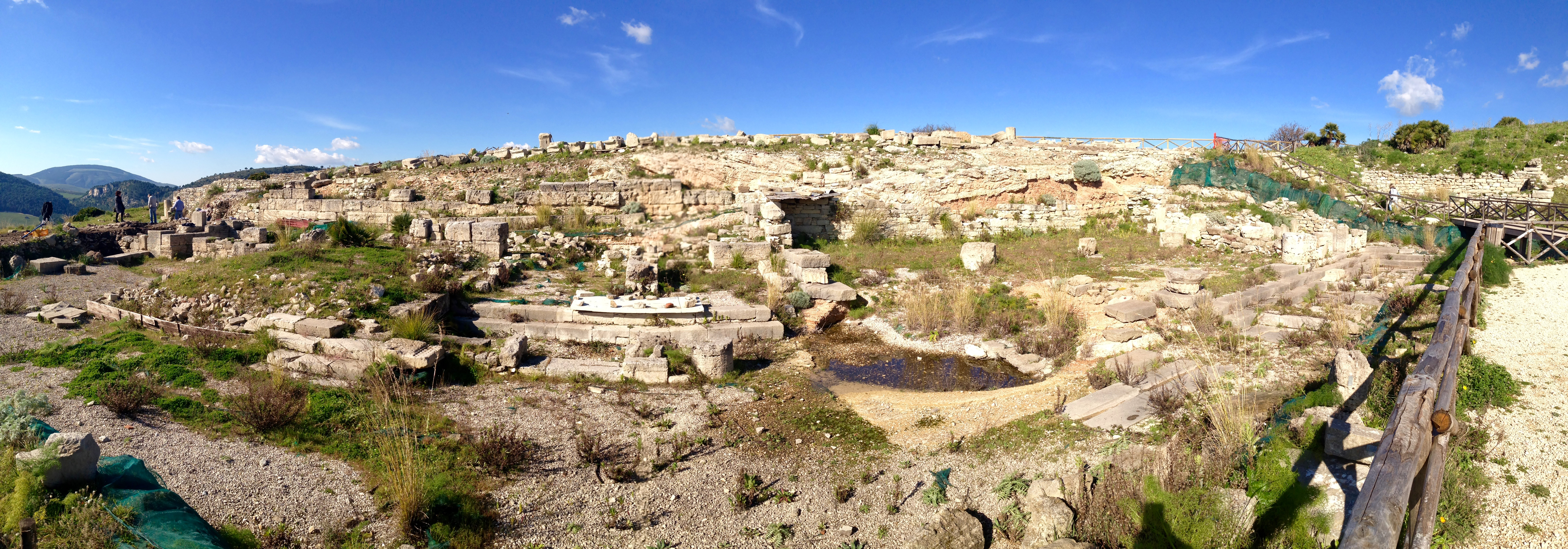 panorama agorà di Segesta